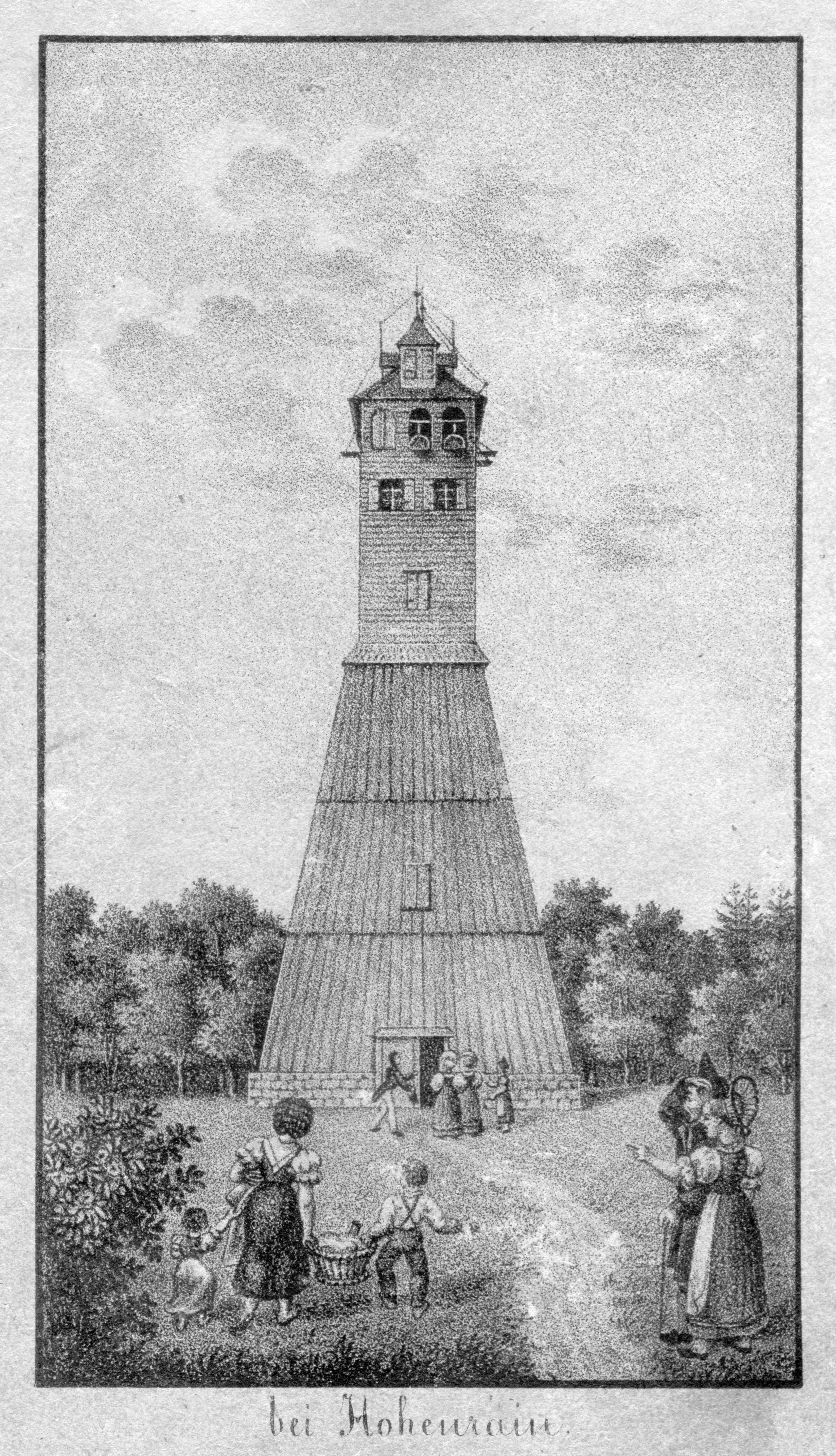 Napoleonturm Hohenrain (Kanton Thurgau, Schweiz), Historischer Stich